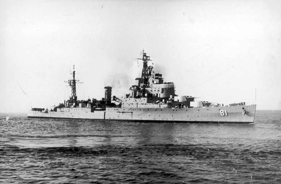 El crucero ligero peruano BAP Almirante Grau CL-81